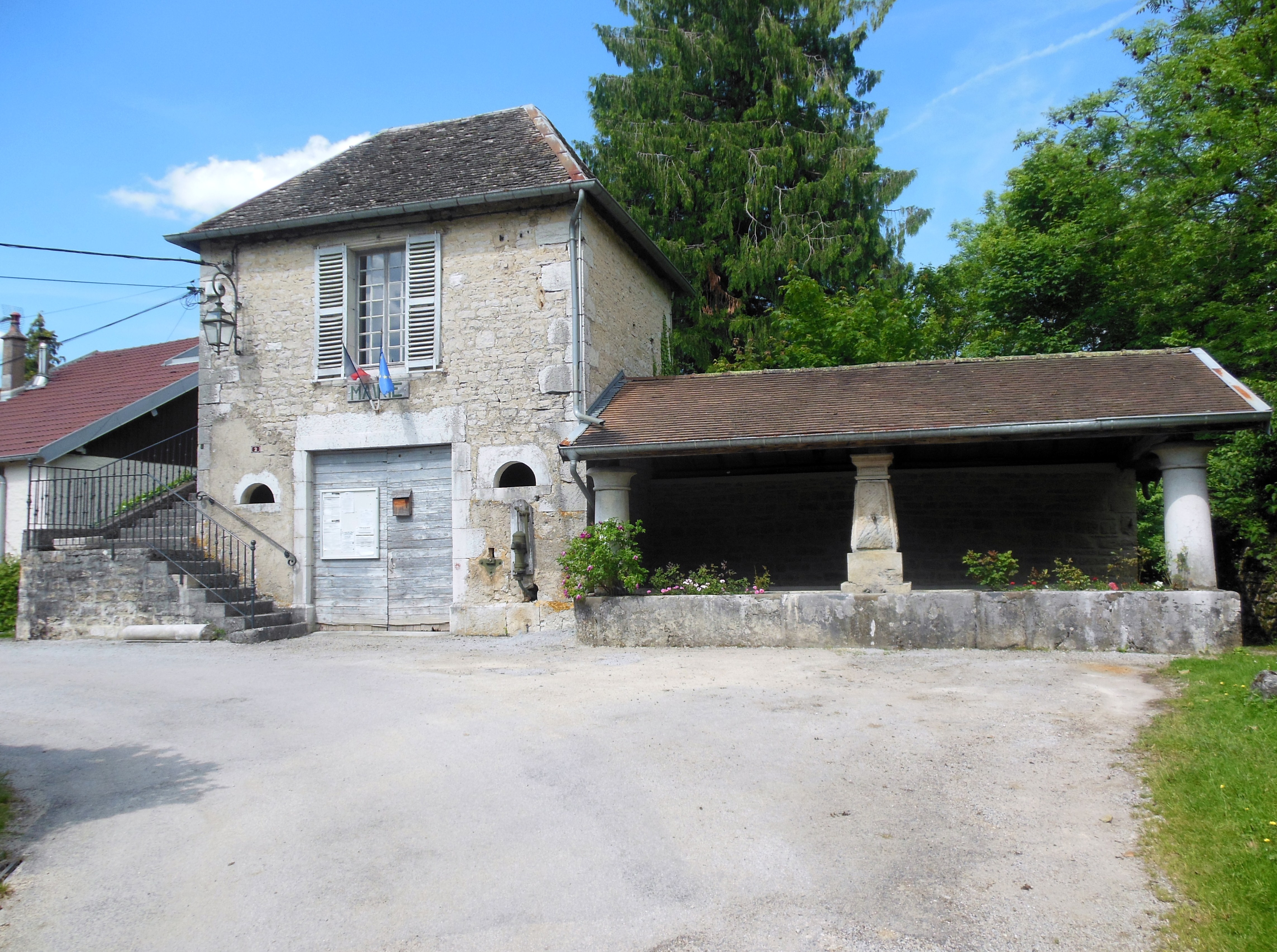 Mairie et lavoir-fontaine (XIXe s) de Châteauvieux-les-Fossés (25).